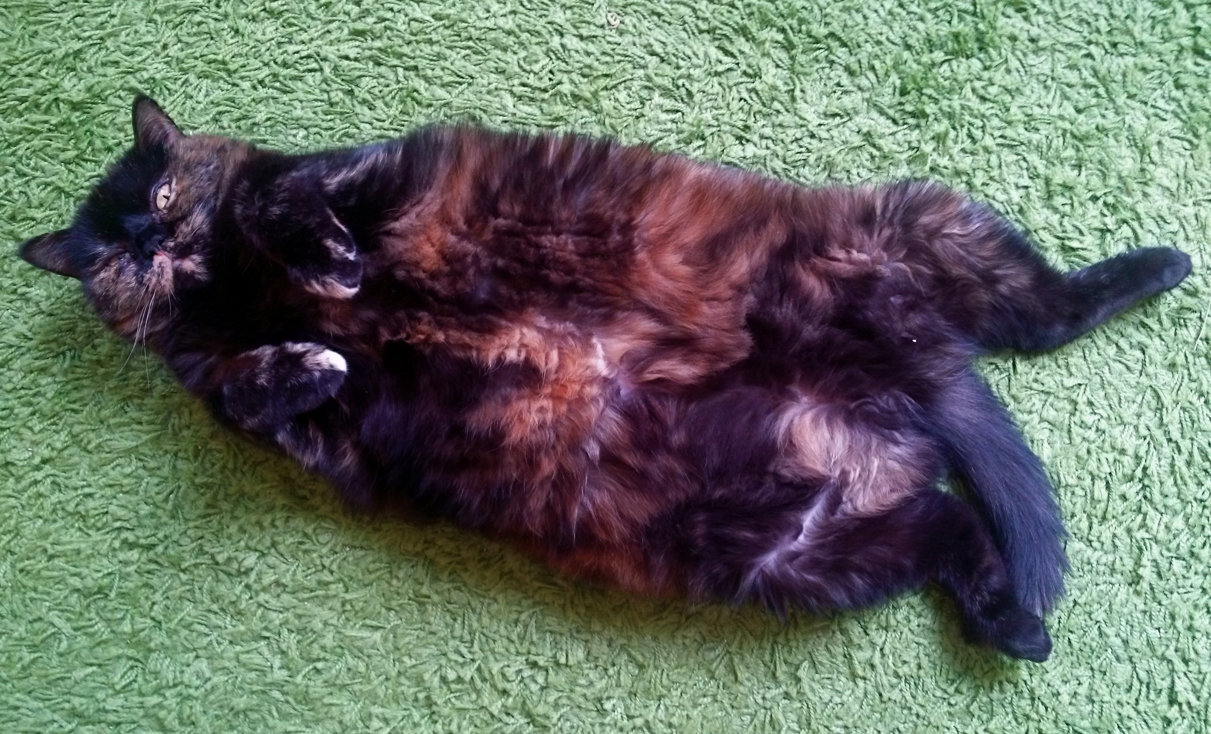 Chat de la race British Shorthair couleur écaille de tortue